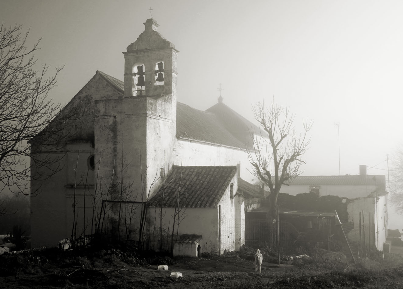 Iglesia de San Juan Evangelista. Gandul. España